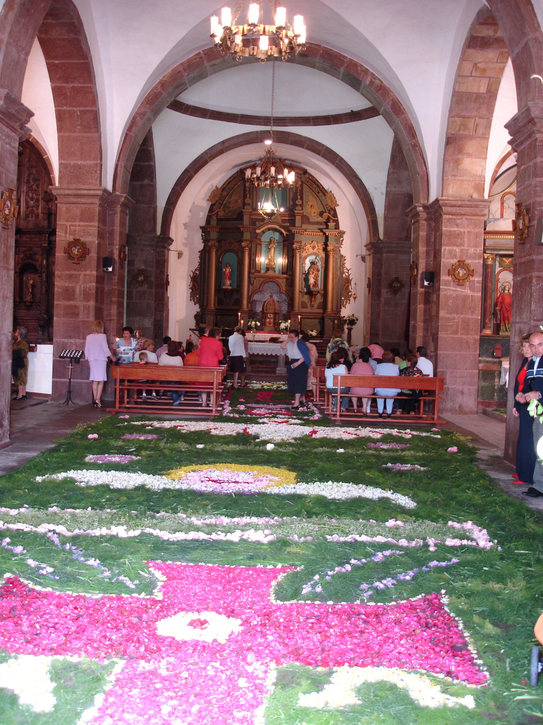 Detalle de la alfombra floral hecha para la ocasión